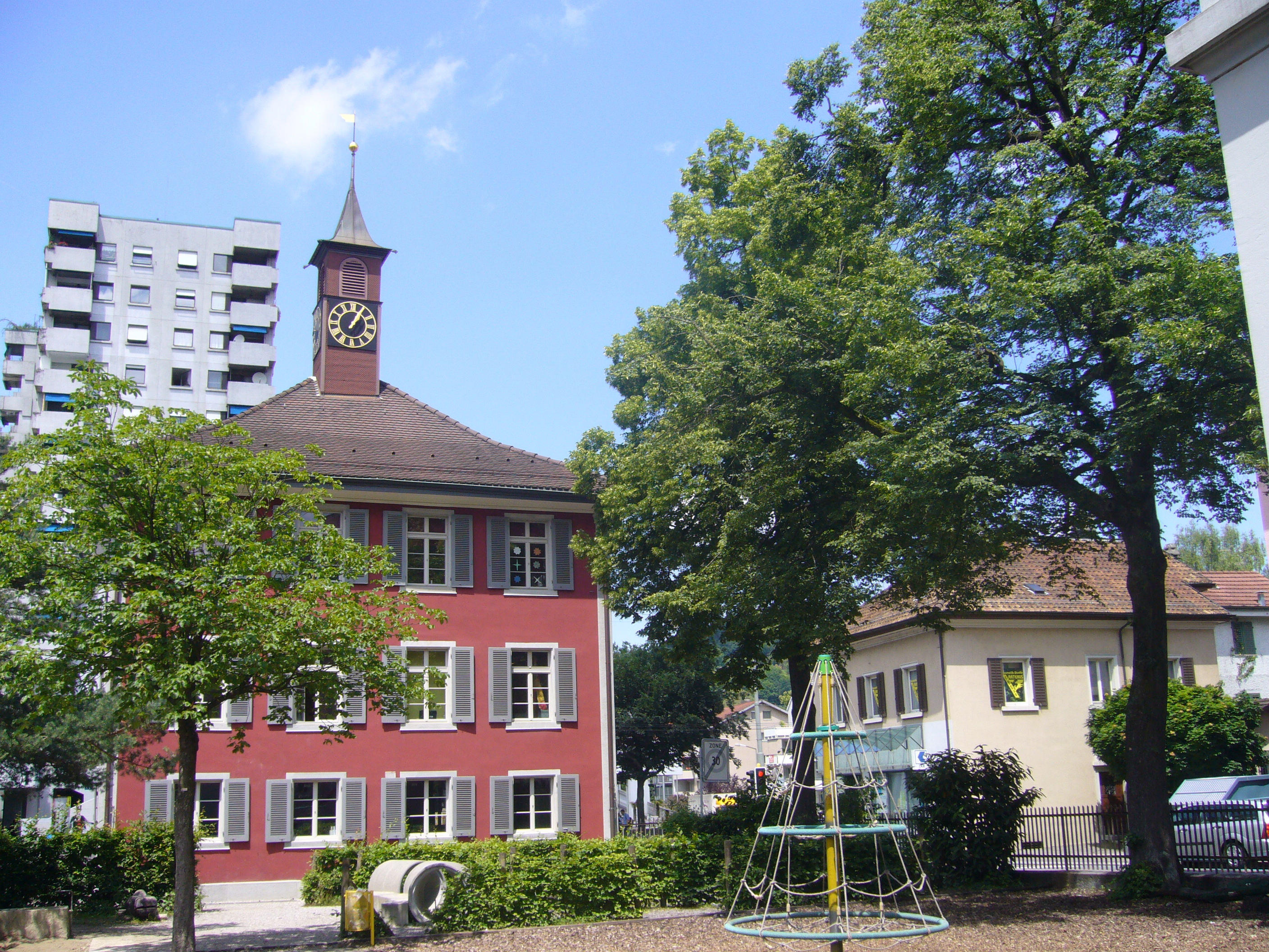 Schulhaus "Altes Gemeindehaus", Töss (Winterthur).